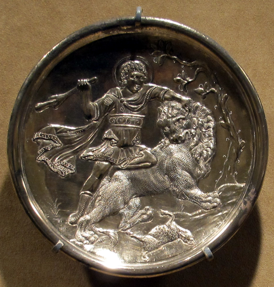 Medieval art in the Metropolitan Museum of Art